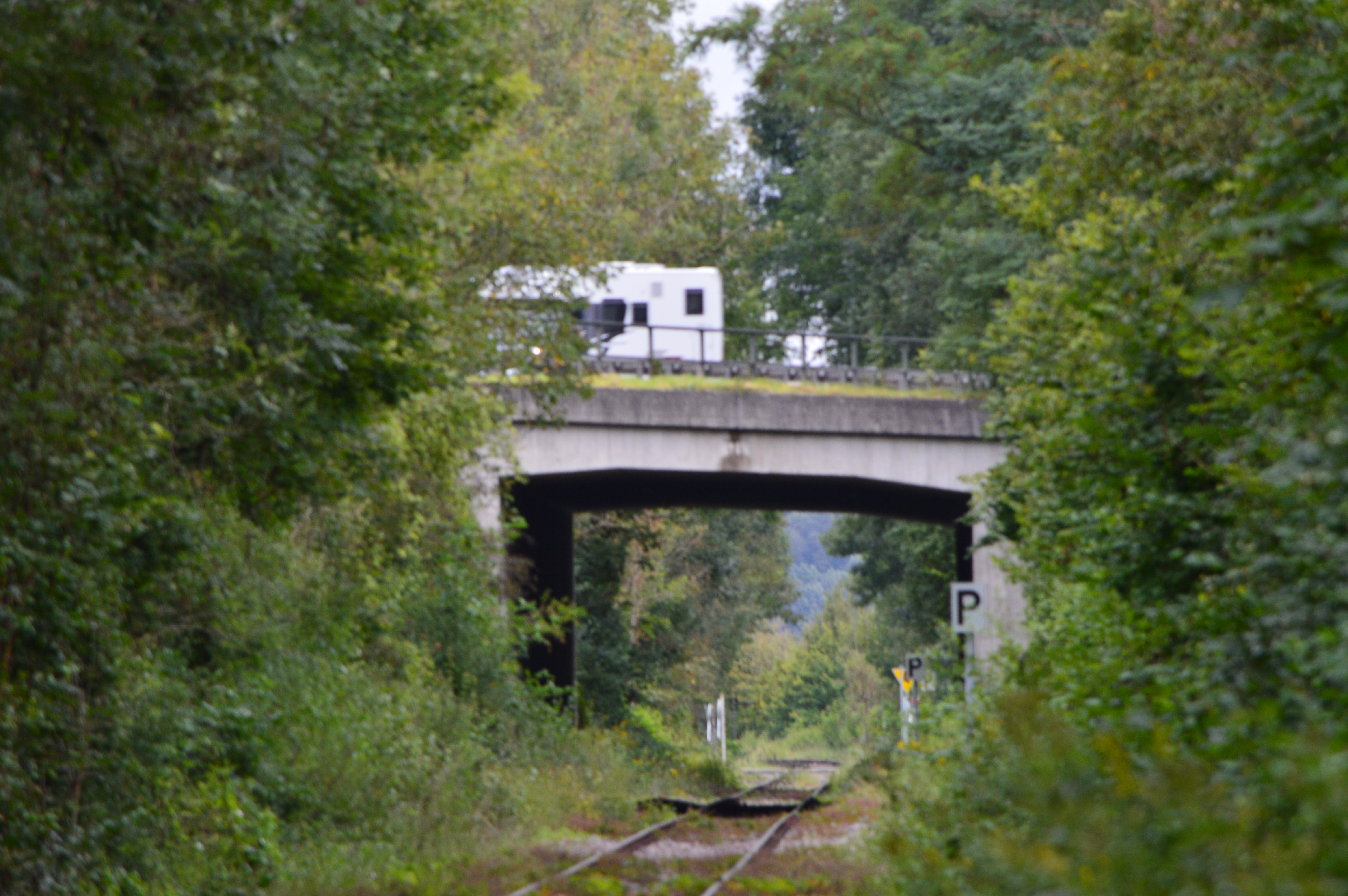 Stroosèübberfüürig vo dè B 314 übber d Wuètèdalbaan südlich vo Eggingè.